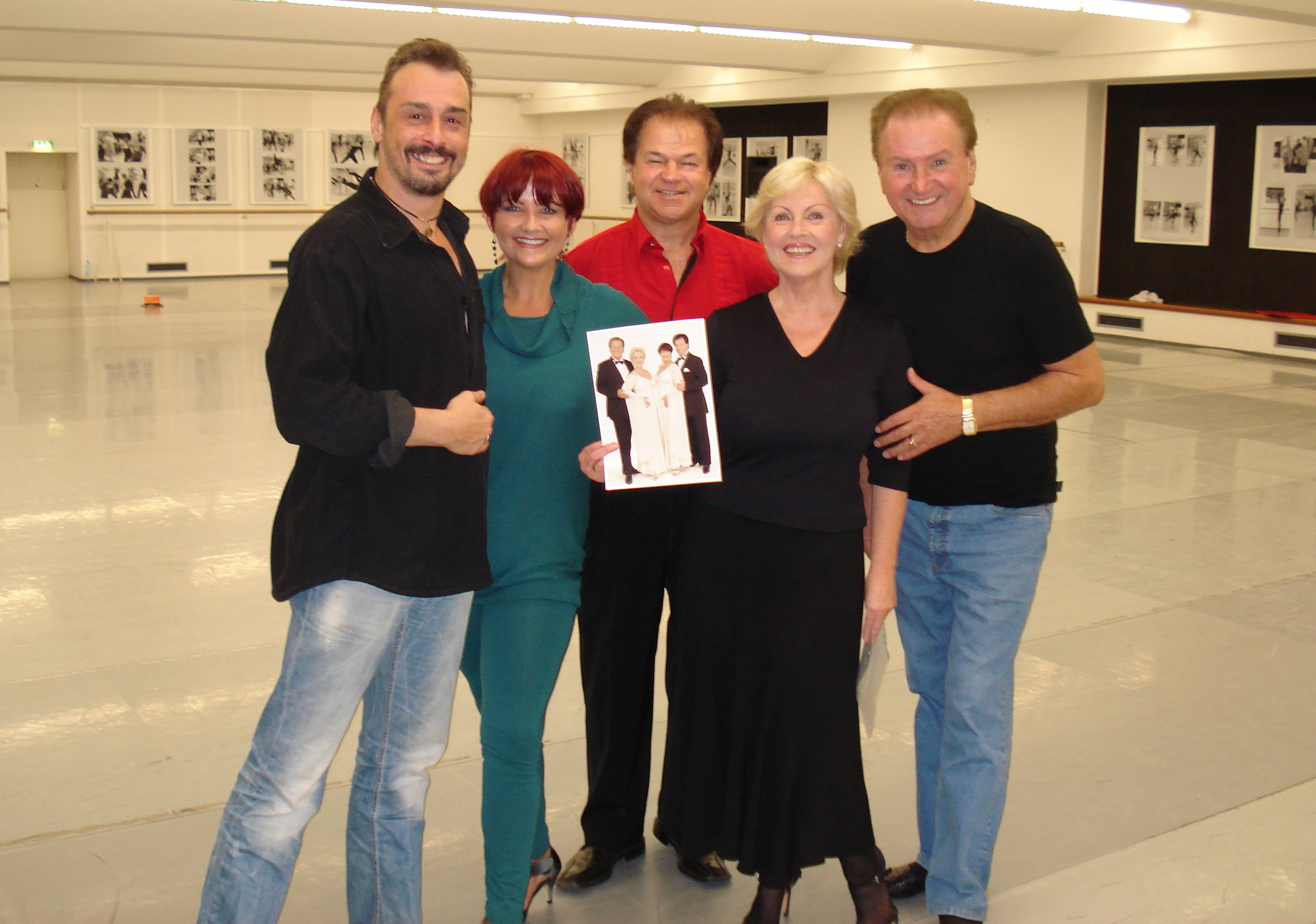 André Höhl (links) choreographiert im Probensaal des Dt. Fernsehballetts des MDR in Berlin die Show der Paare mit Andrea und Wilfried Peetz sowie Petra Kusch-Lück (2. v. r.) und Roland Neudert (rechts).